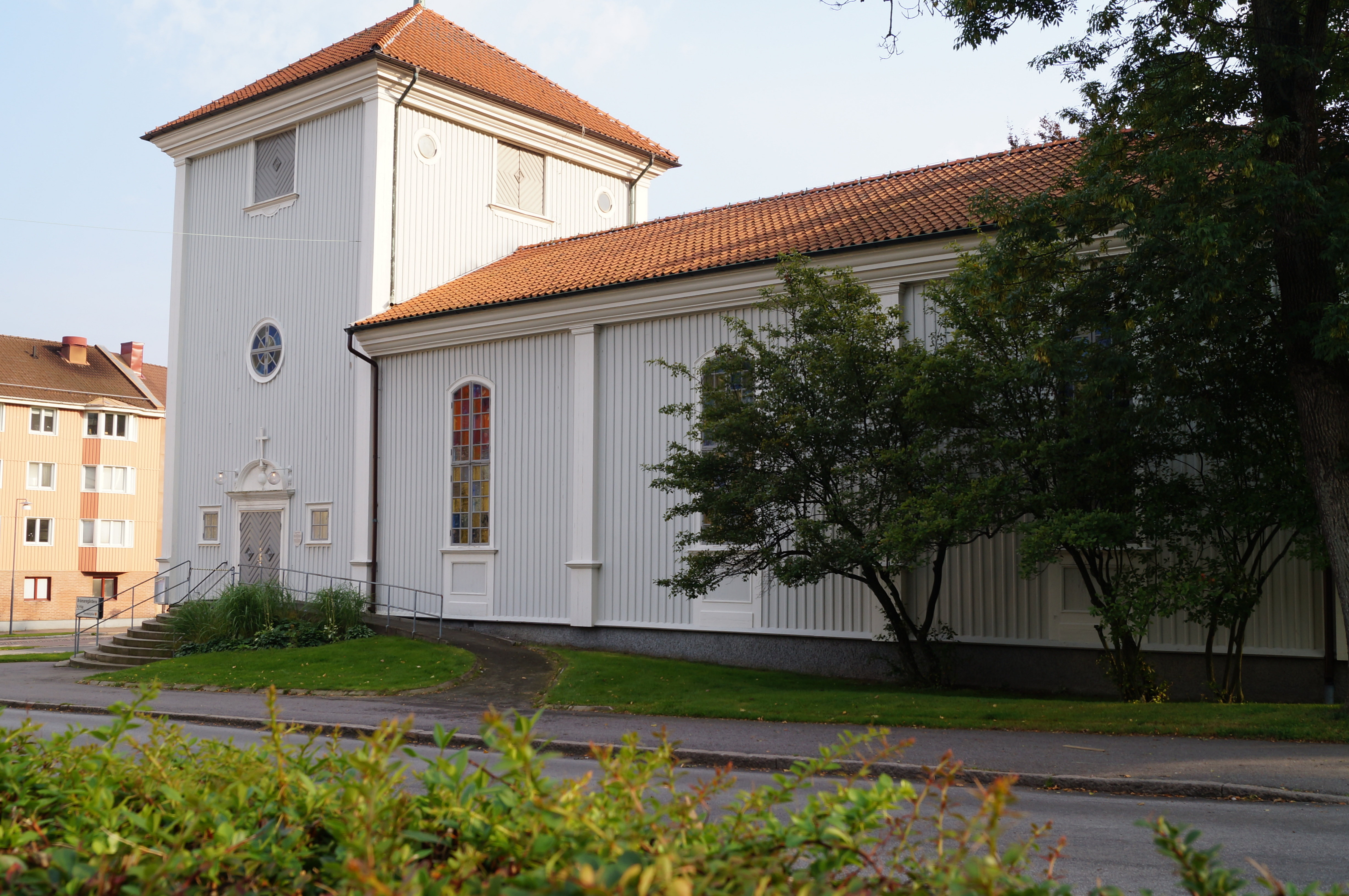 Brämaregårdens kyrka från nordost.